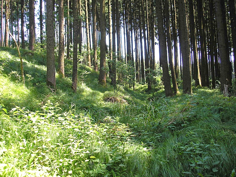 Frühmittelalterlicher Ringwall "Vorderer Schlossberg" bei Mering (Landkreis Aichach-Friedberg, Bayerisch-Schwaben. Die Westseite mit dem Graben. Blick nach Süden. Eigene Aufnahme, Juli 2005 / Early Middle Age ringwork "Vorderer Schlossberg" near Mering (Bavaria, Germany). Western part, looking south into the moat. Own photo, July 2005